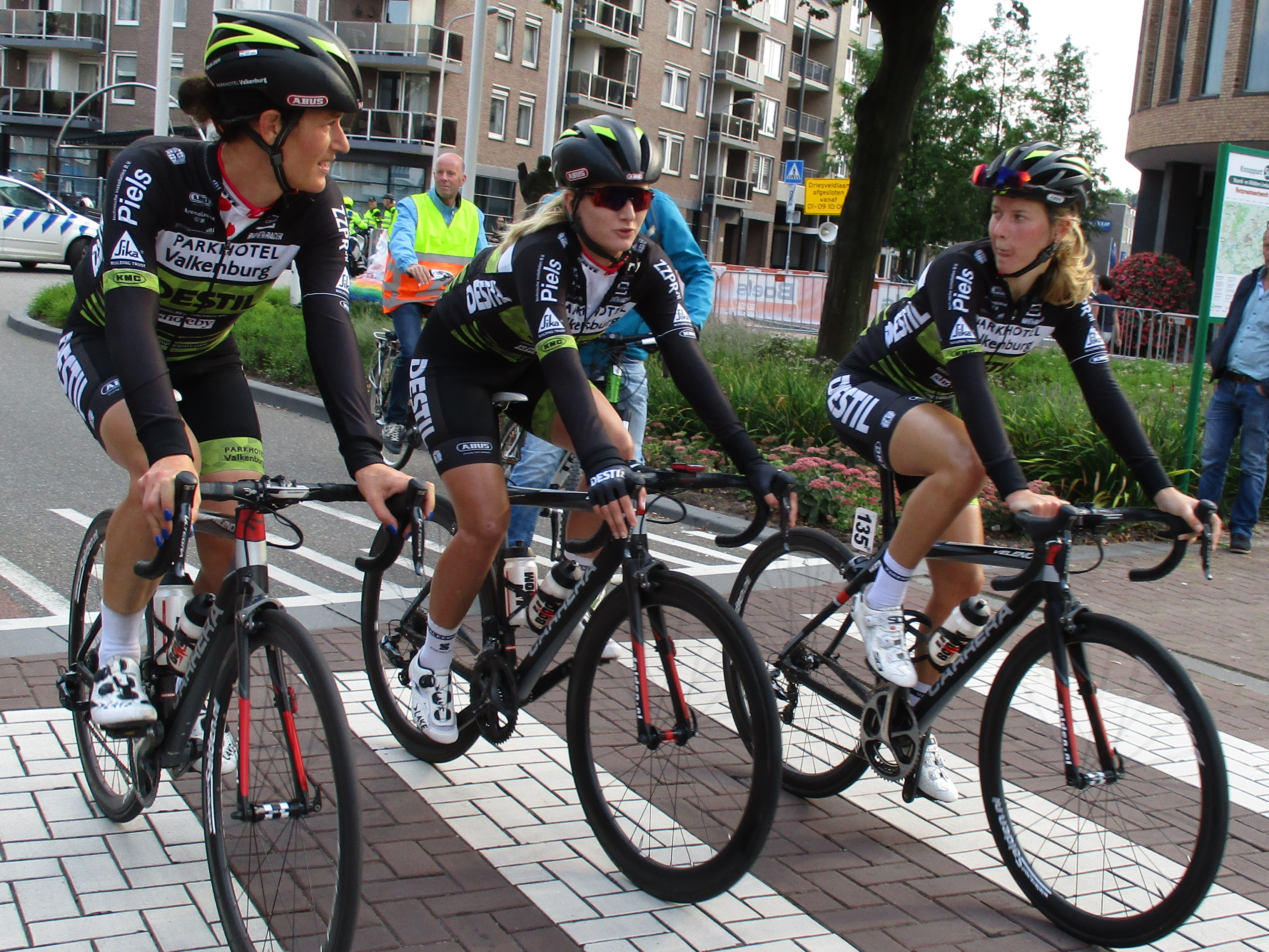 4e etappe van de Boels Ladies Tour 2017 door Noord-Limburg, finish in Weert.